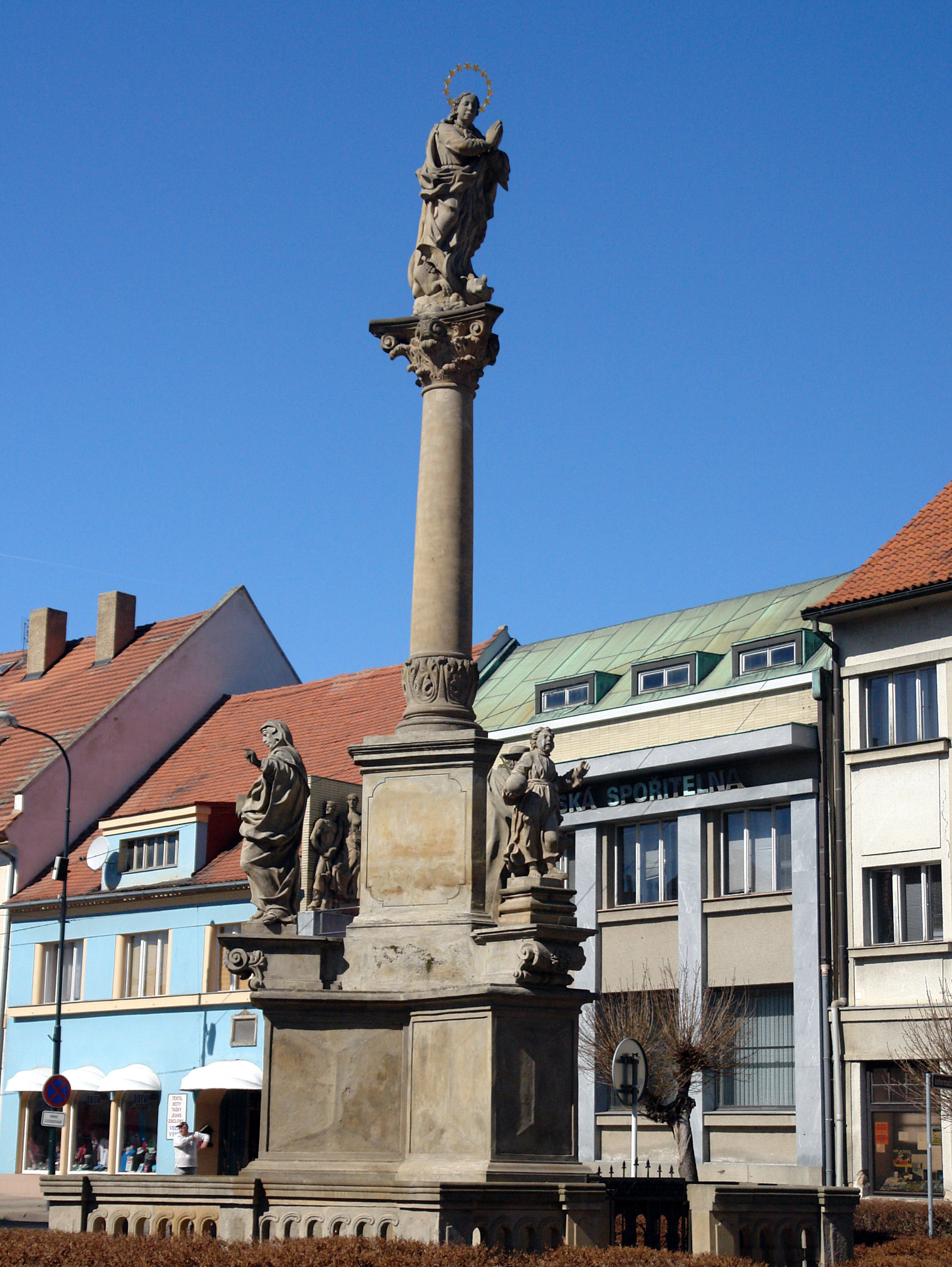 Sloup se sochou P. Marie (Libochovice), Libochovice